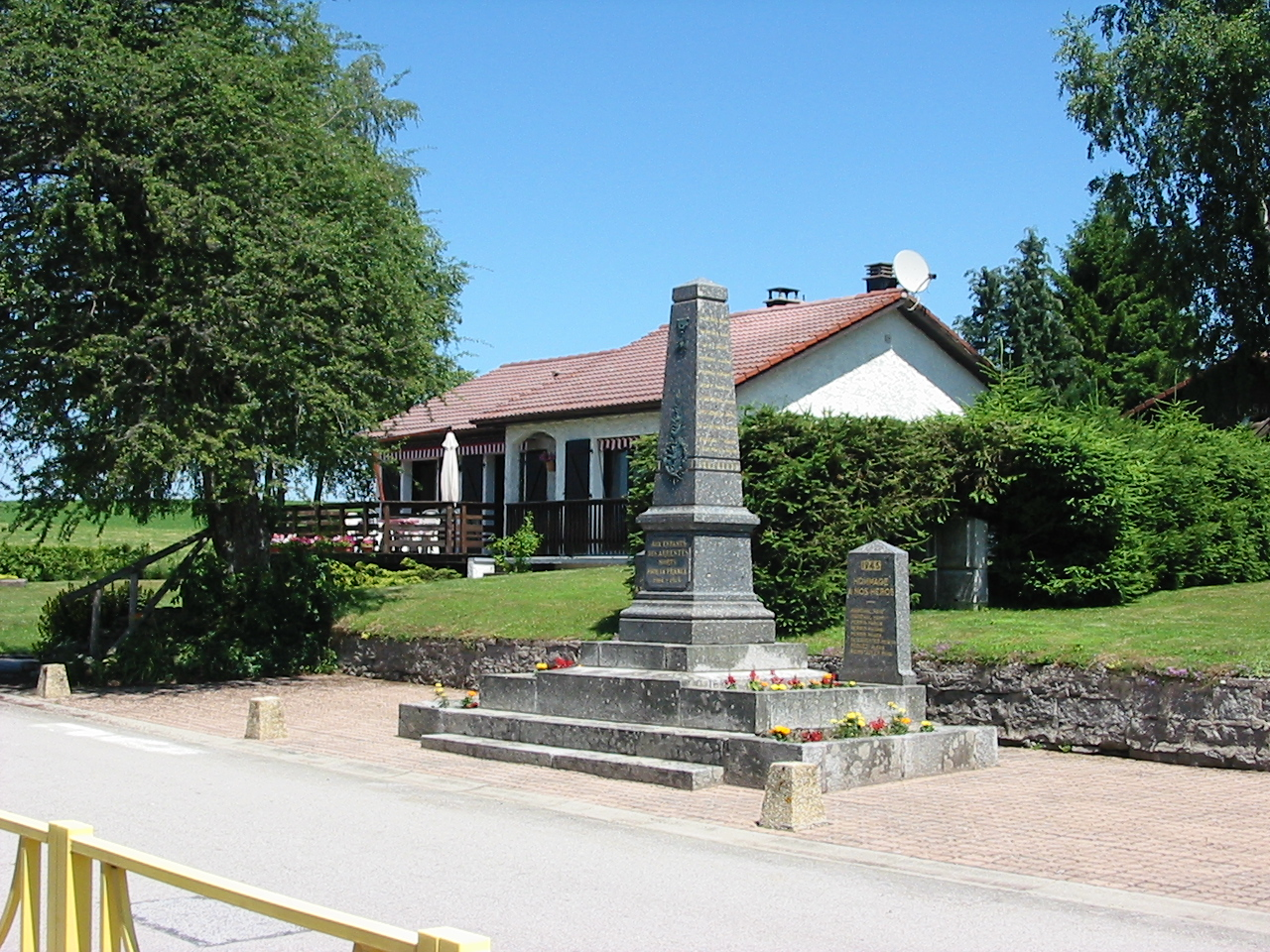 Arrentès-de-Corcieux, commune des Vosges : au Houssot, le monument aux morts.